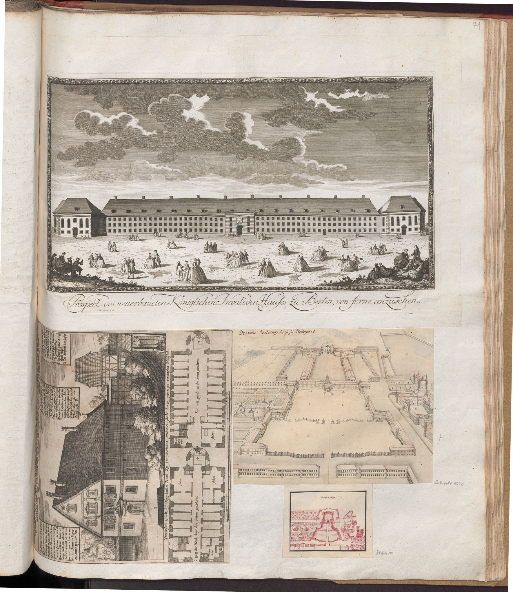 Sammlung Nicolai: Band 2, Blatt 71r